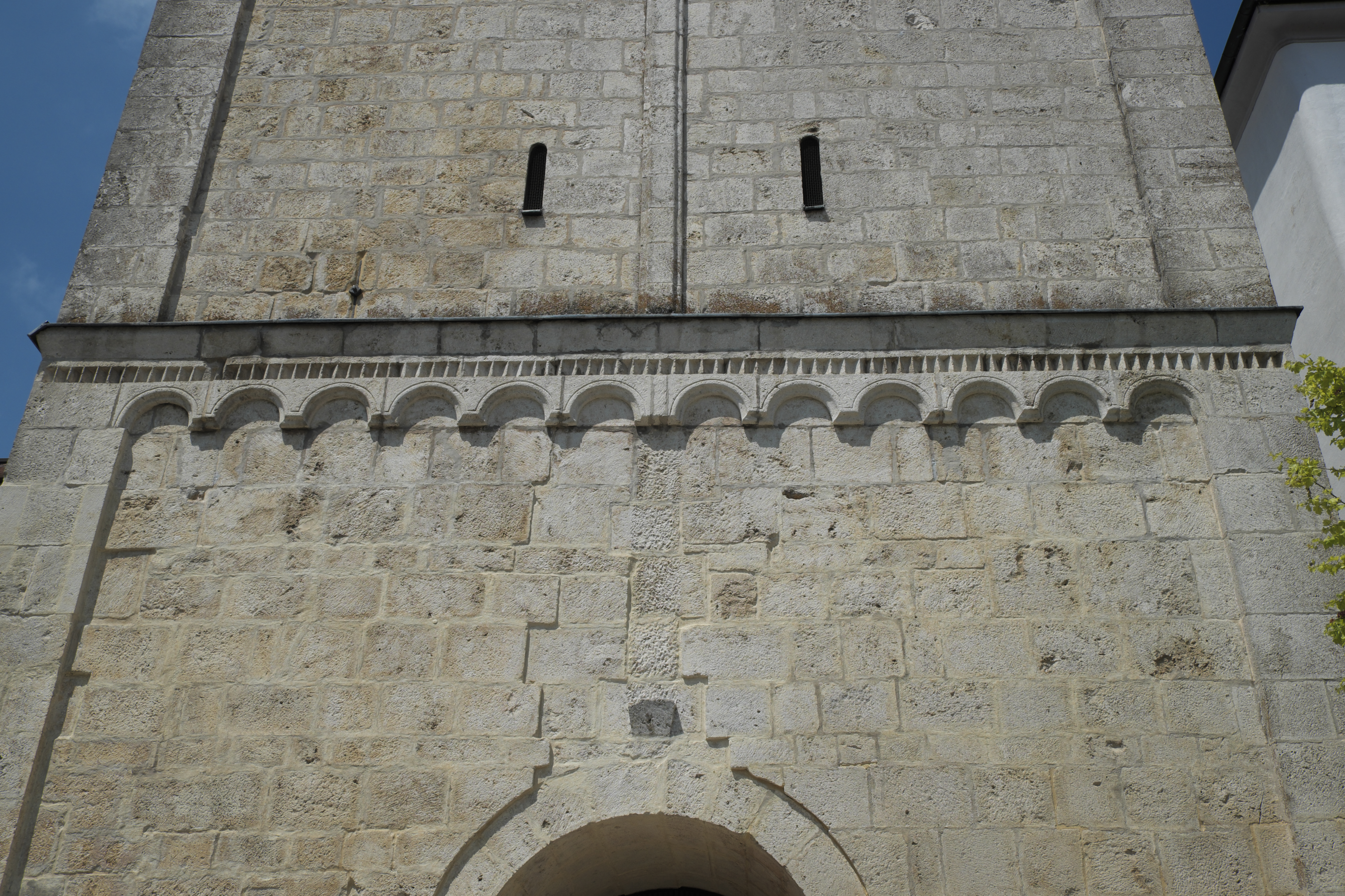 Wallfahrtskirche Heilig Kreuz, ehemalige Klosterkirche des Klosters Bergen in Bergen, einem Ortsteil von Neuburg an der Donau im Landkreis Neuburg-Schrobenhausen (Bayern), romanischer Glockenturm mit Zahn- und Bogenfries